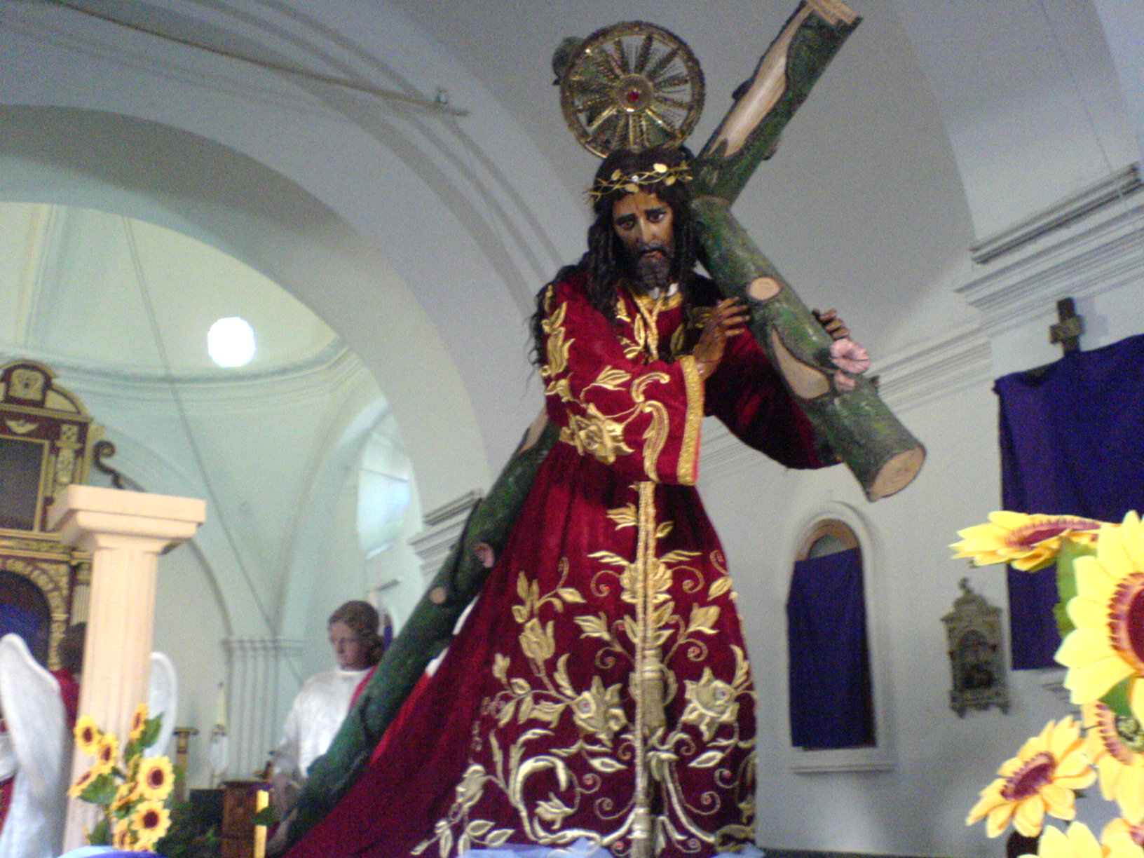 Es Una foto de Jesús Nazareno de Santa Lucia Cotzumalguapa